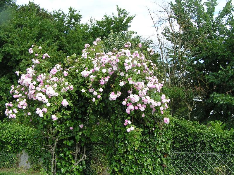 rosier pompon rose